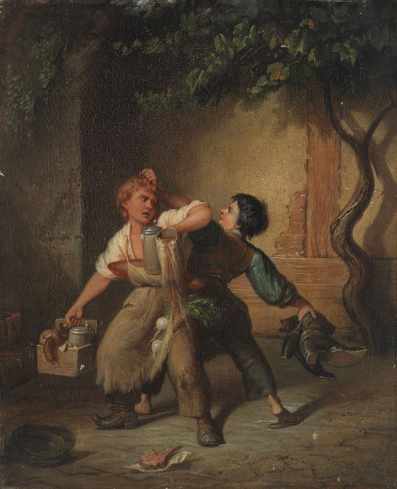 Die Rache. Öl auf Leinwand. 36,5 x 30 cm